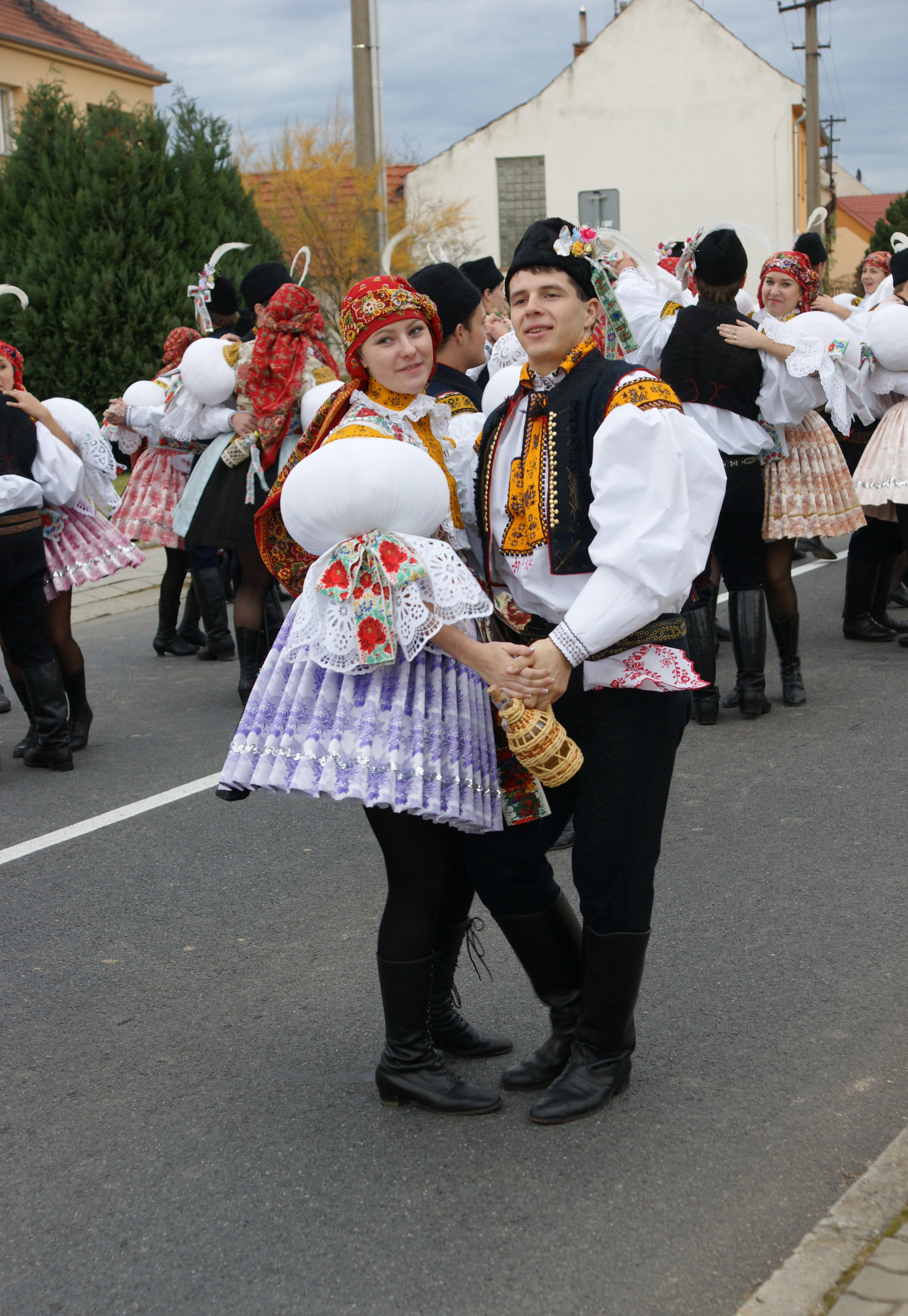 Tanec nedachlebské krojované chasy. Martinské hody 2010.